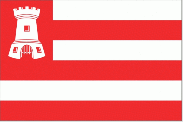 Vlag van de gemeente Alkmaar